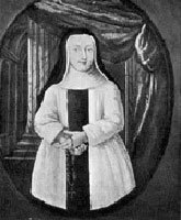 Susanne von Klettenberg (1723-1774), Gemälde